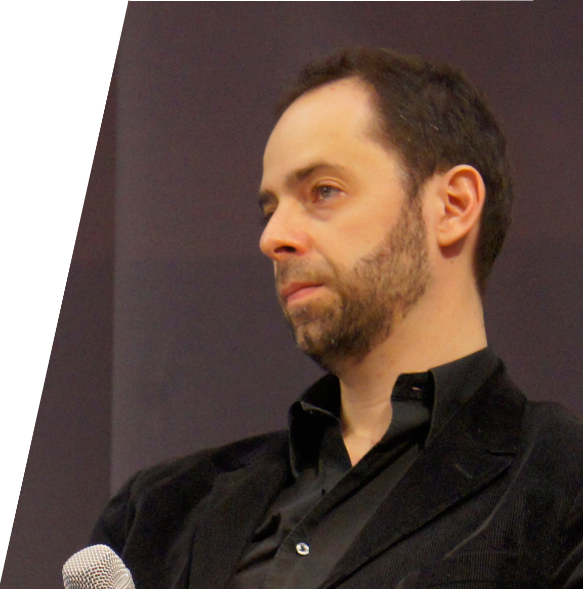 Julien Rappenau au Salon du Livre 2012.